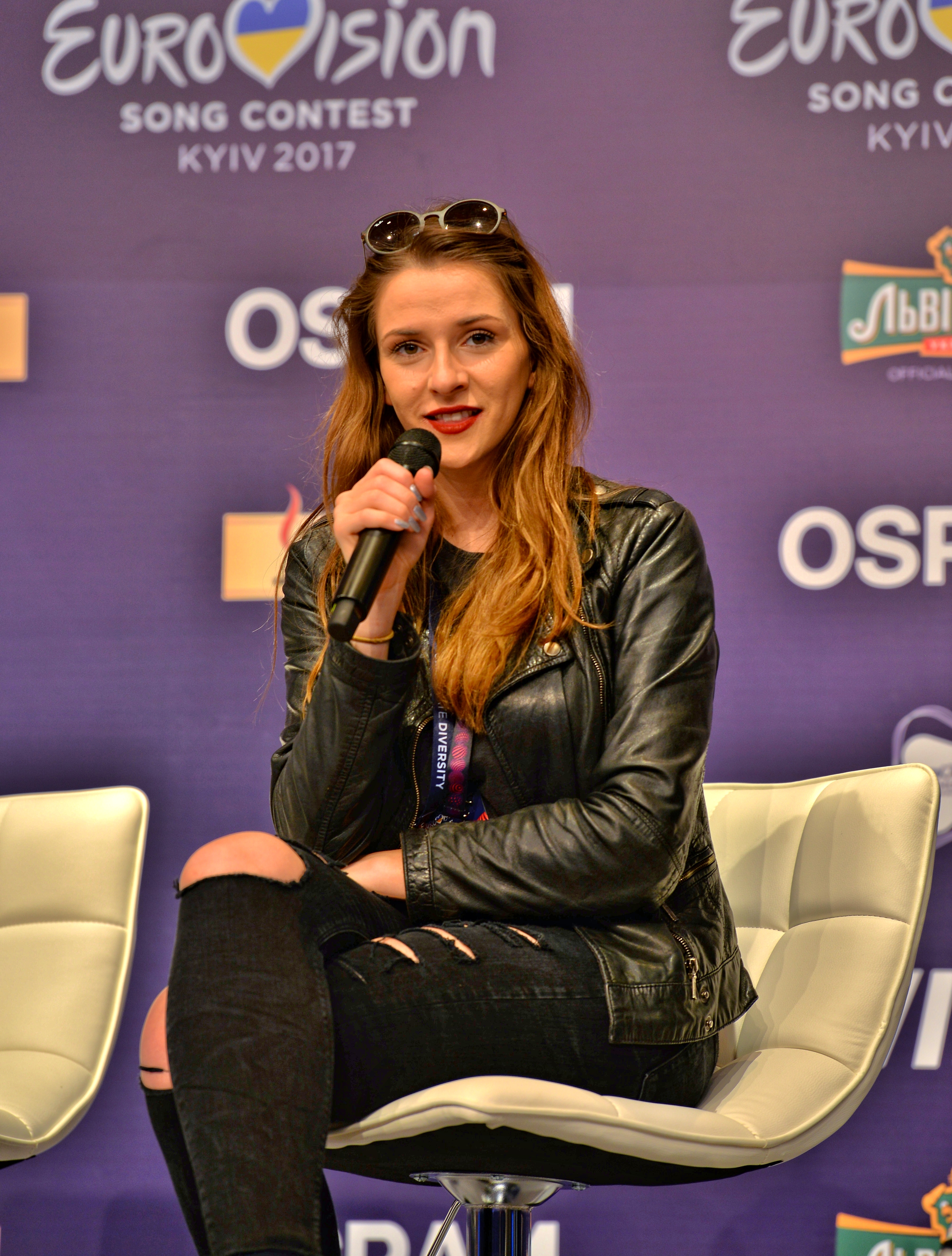 Чорногорська співачка Яна Бурческа на зустрічі з журналістами під час пісенного конкурсу Євробачення в Києві 2017